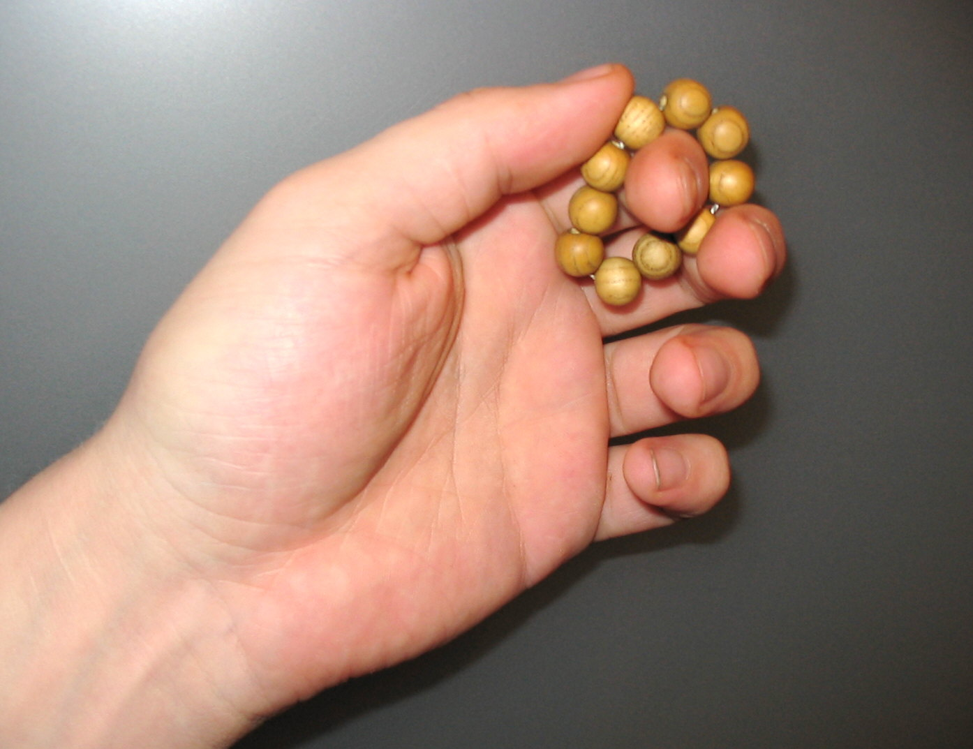 One-finger prayer beads